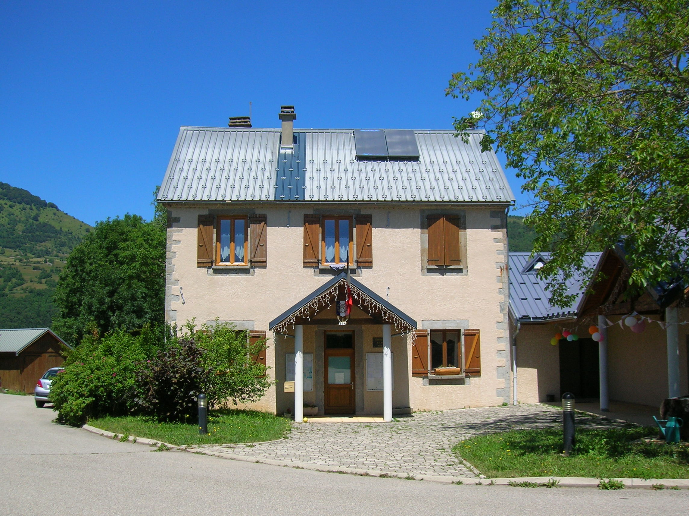 Les Côtes-de-Corps, Isère, France.